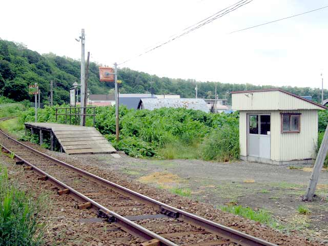 朱文別駅全景 撮影場所 朱文別駅舎近くの築堤。 撮影者によるGFDLリリース